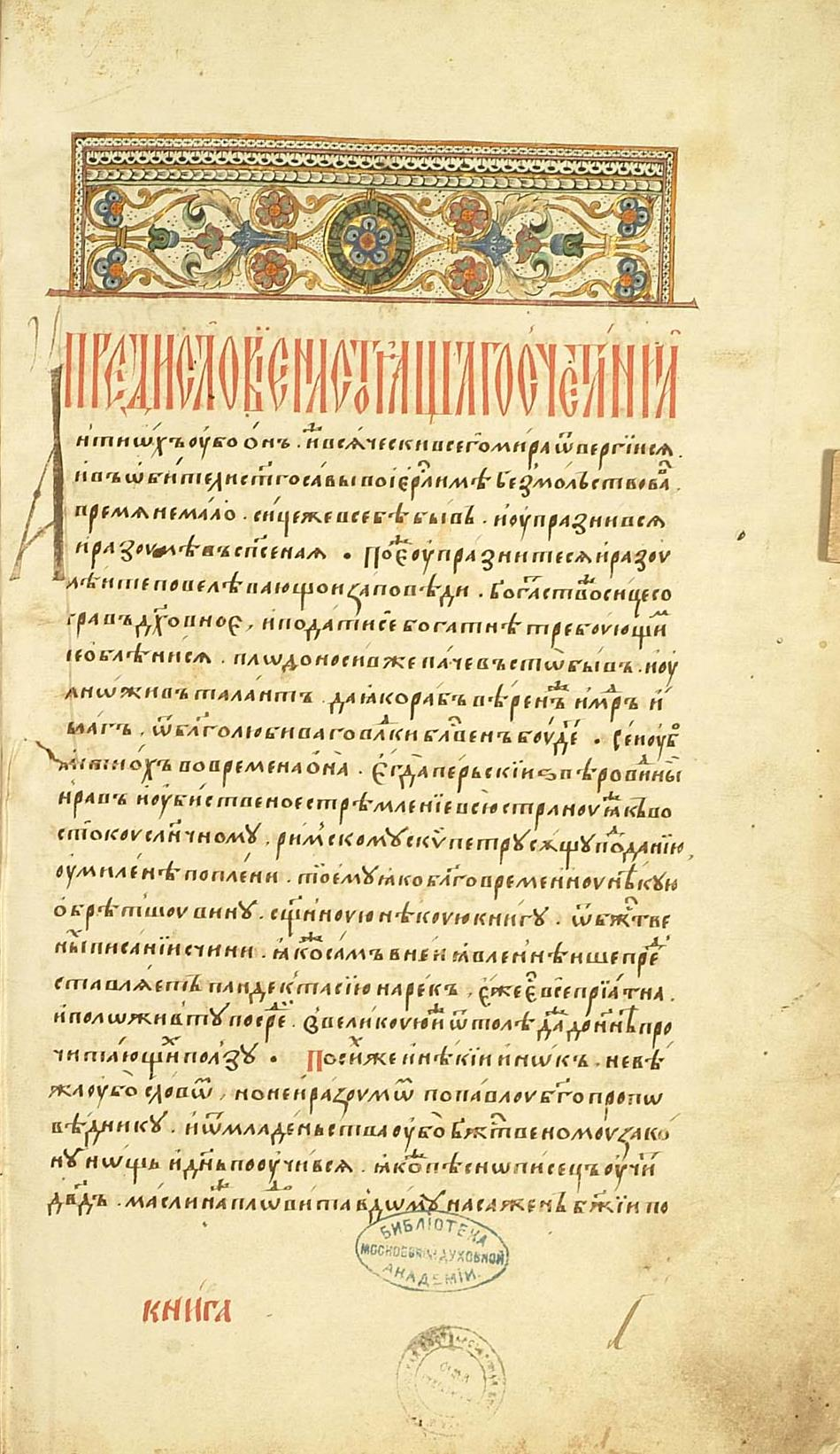 Рукопись № 56. Пандекты и Тактикон Никона Черногорца. Фонд 173.I. Фундаментальное собрание библиотеки МДА.